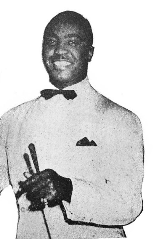 Jimmie Lunceford